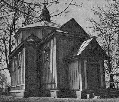 Церква в Усичах